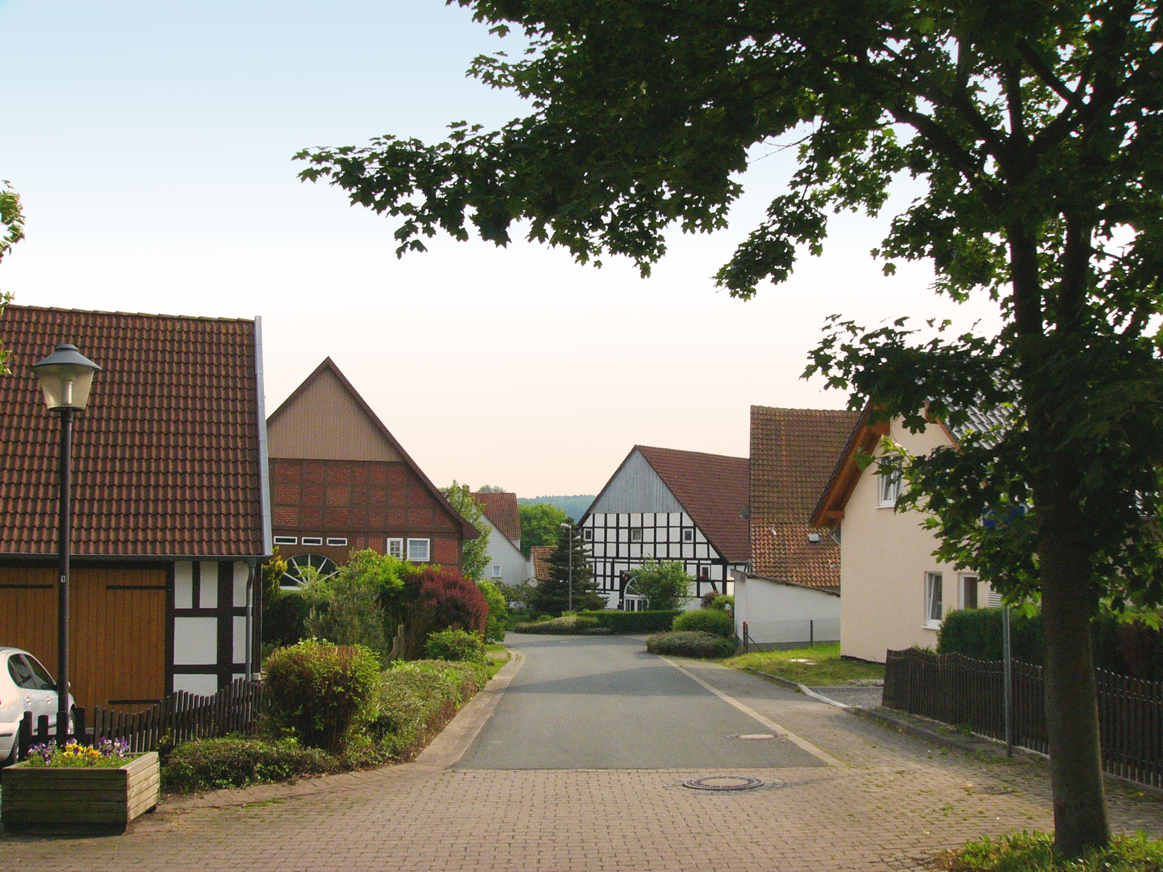 Alte Ortsstraße in Wellentrup, Ortsteil von Blomberg